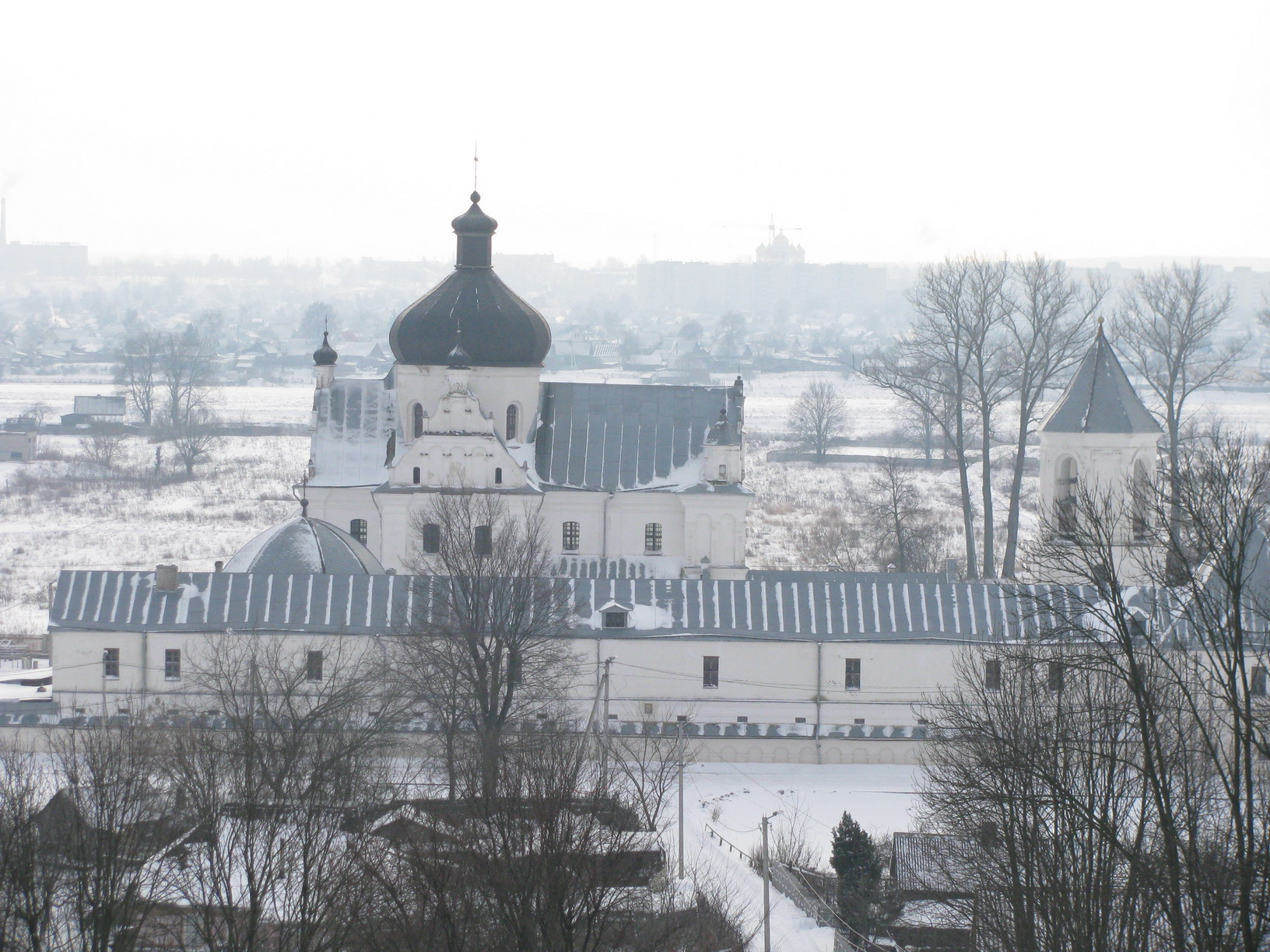 1 Свято-Никольский монастырь в Могилёве (Беларусь). Вид с улицы Боткина зимой.